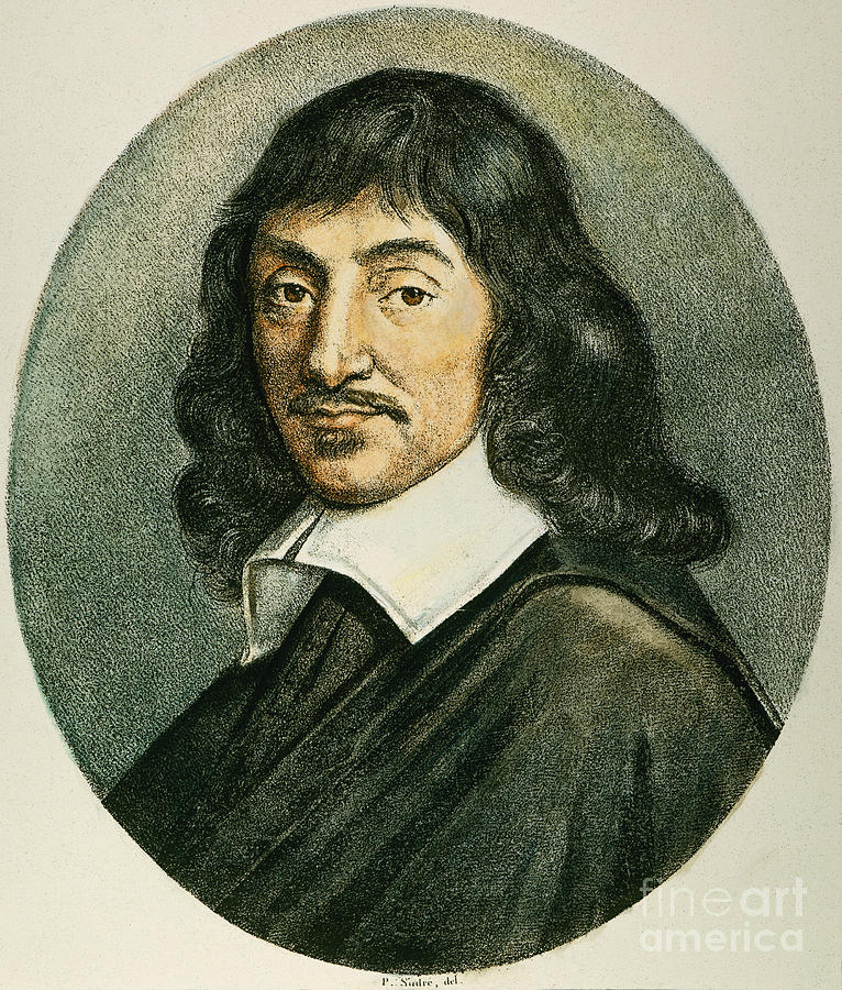 Декарт. Литография. XIX в. Коллекция Грейнджера, Нью-Йорк, США.